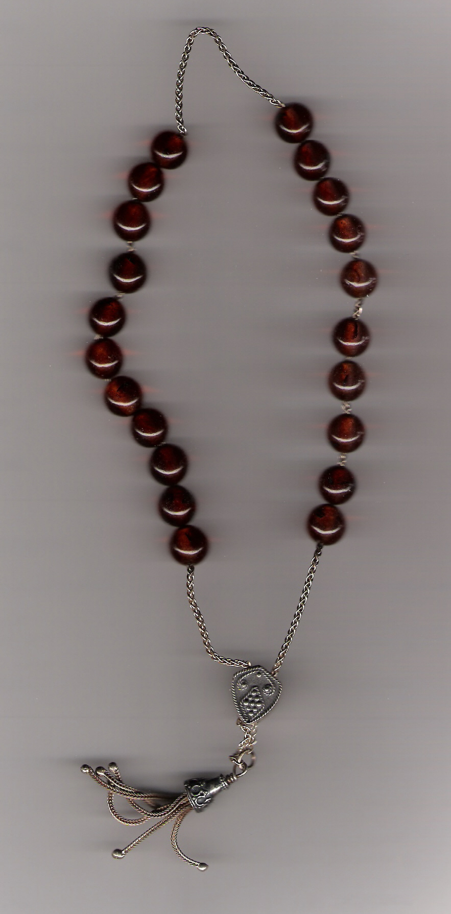 Greek men toy